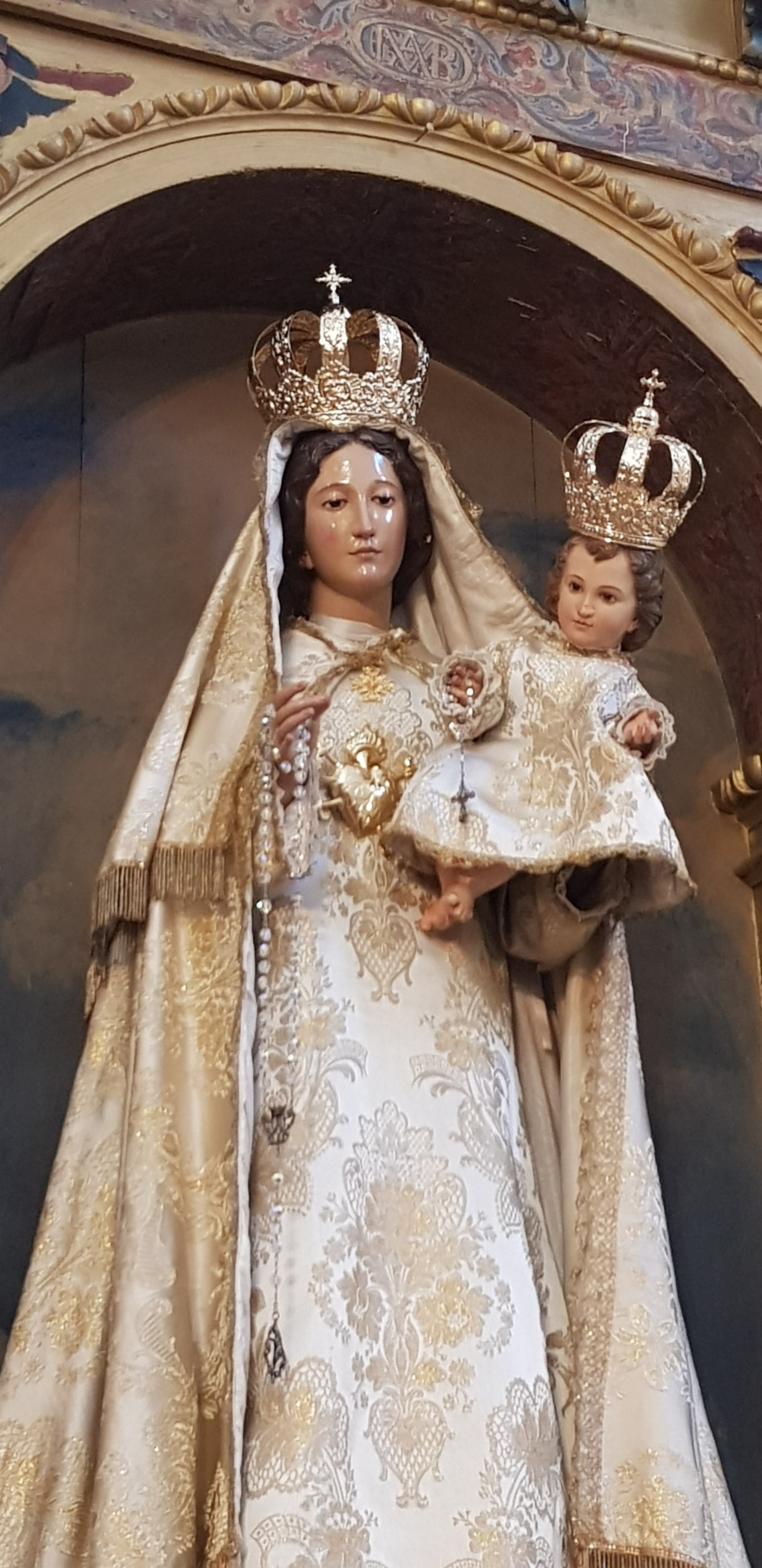 Imagen de la Virgen del Rosario, patrona de Herreruela de Oropesa